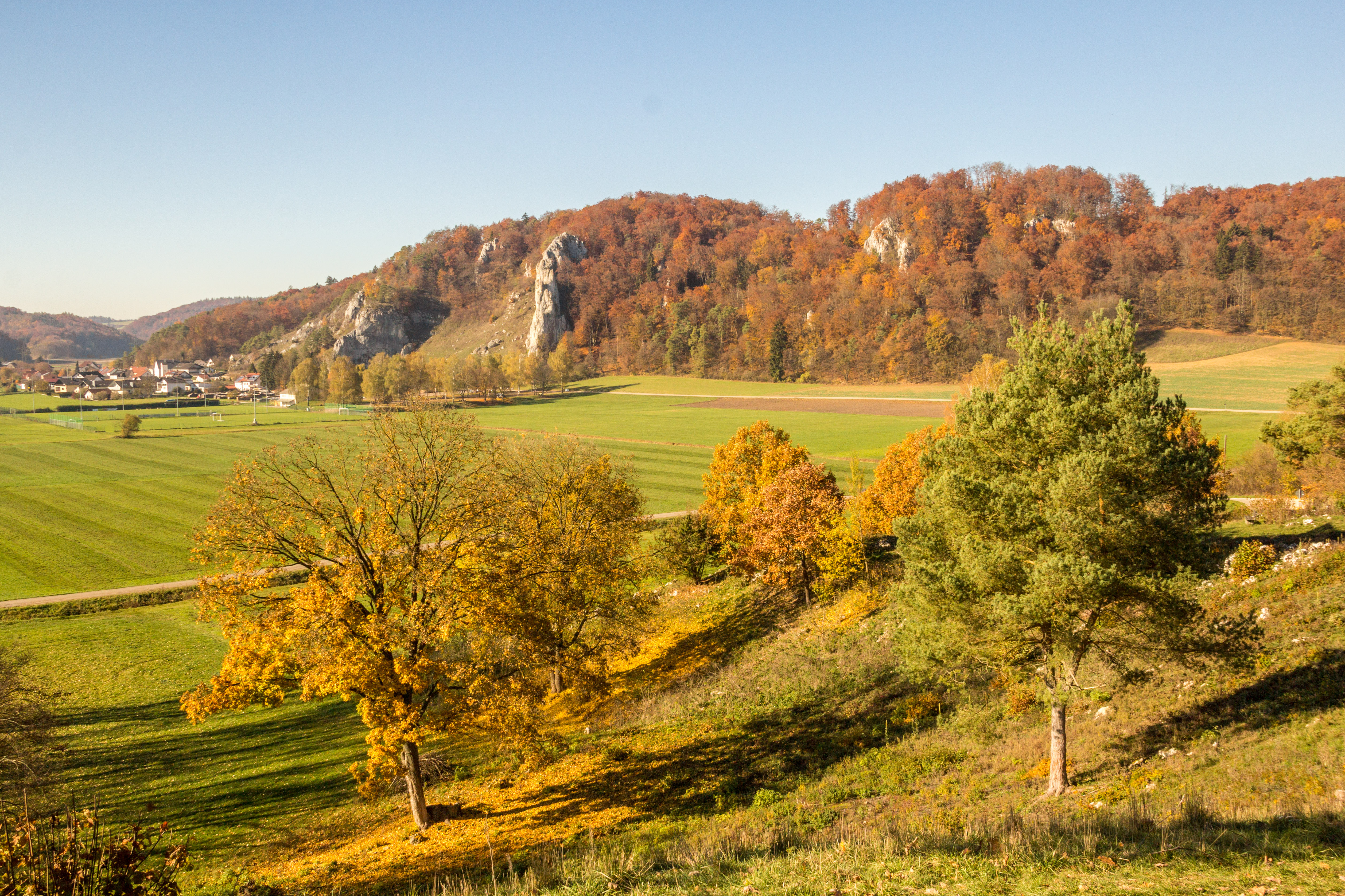 Wellheim, Wellheimer Trockental, Geotop